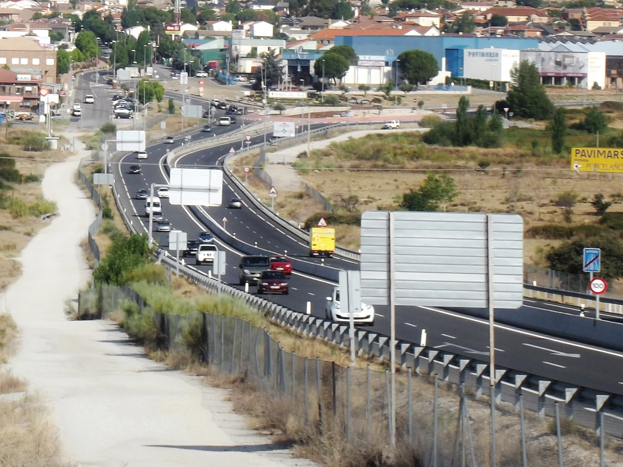 Tramo Chapinería-Navas del Rey de la M-501 junto a Navas del Rey